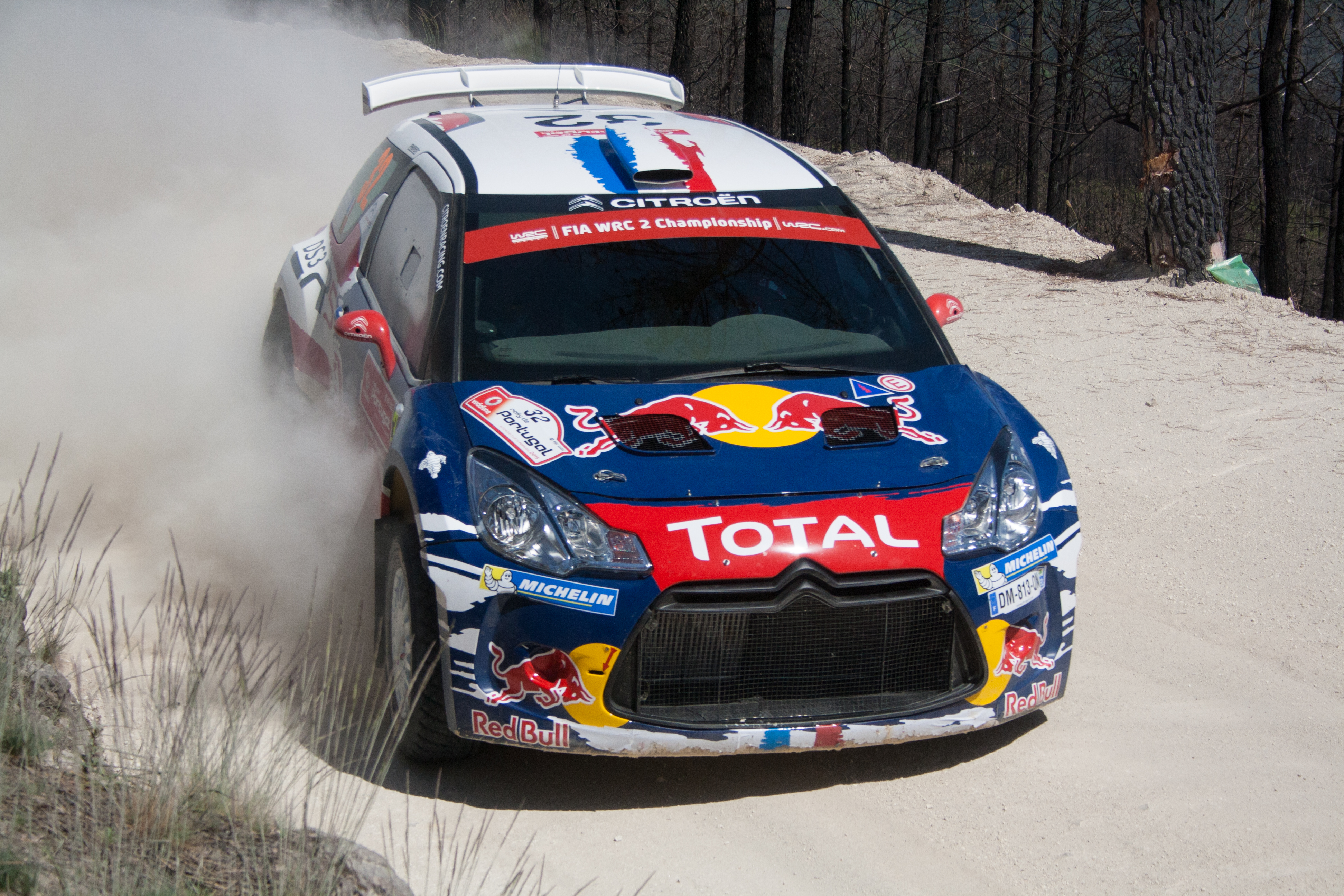 S. Lefebvre - S. Prevot